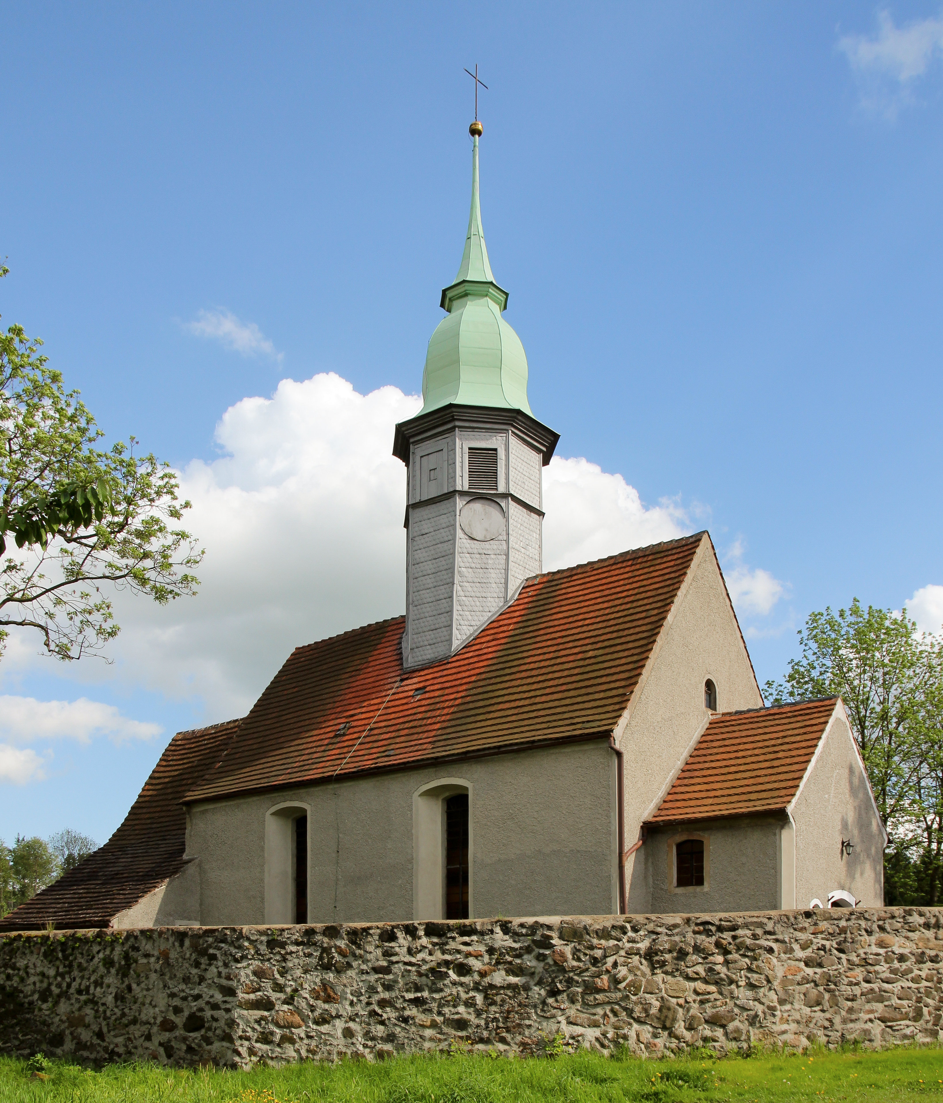 Białogórze – dawny kościół ewangelicki, obecnie filialny rzymskokatolicki pw. św. Andrzeja Boboli (zabytek nr A/2114/1889 z 5.01.1967)